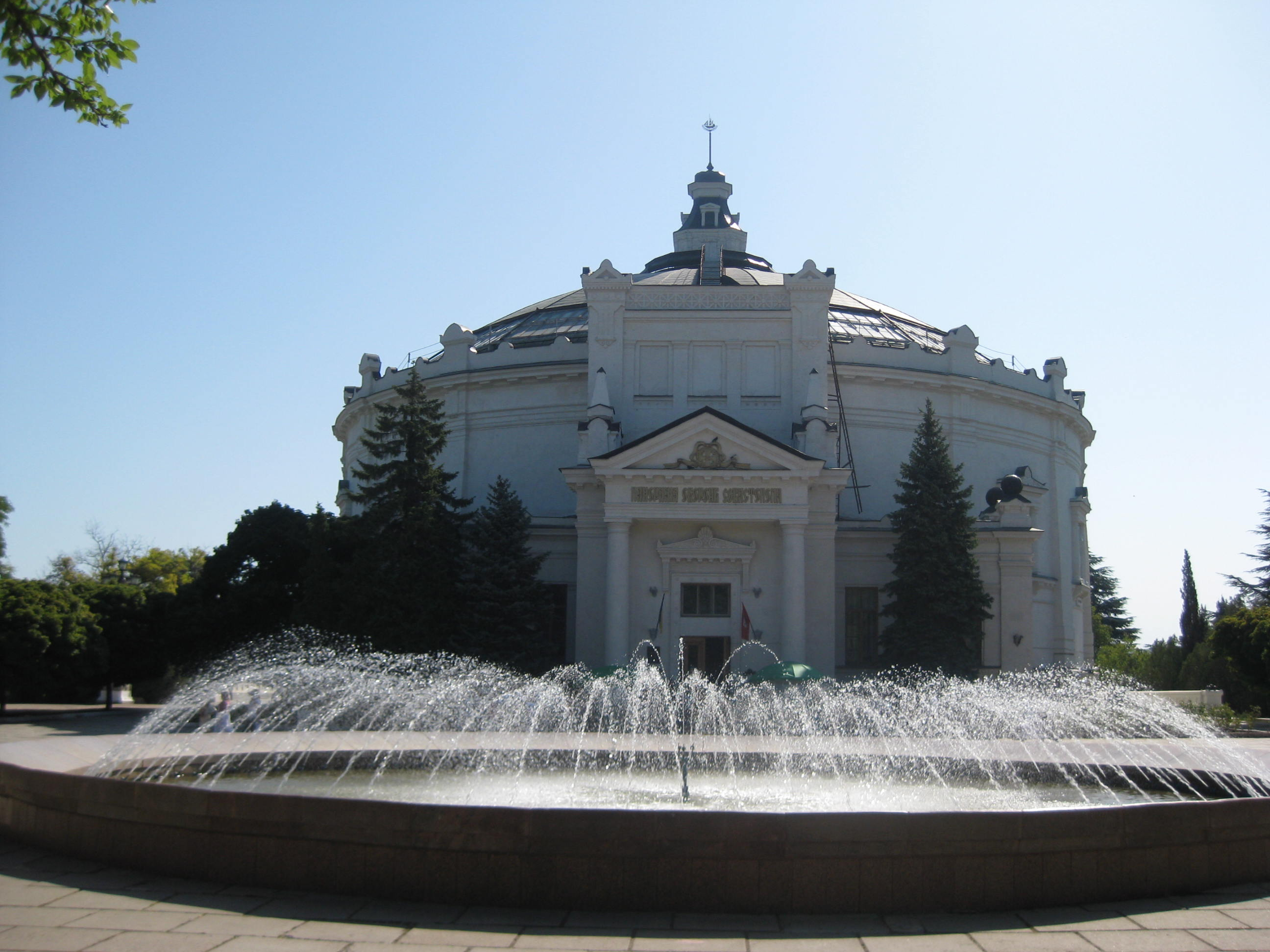 Panorama in Sebastopol, Oekraïne